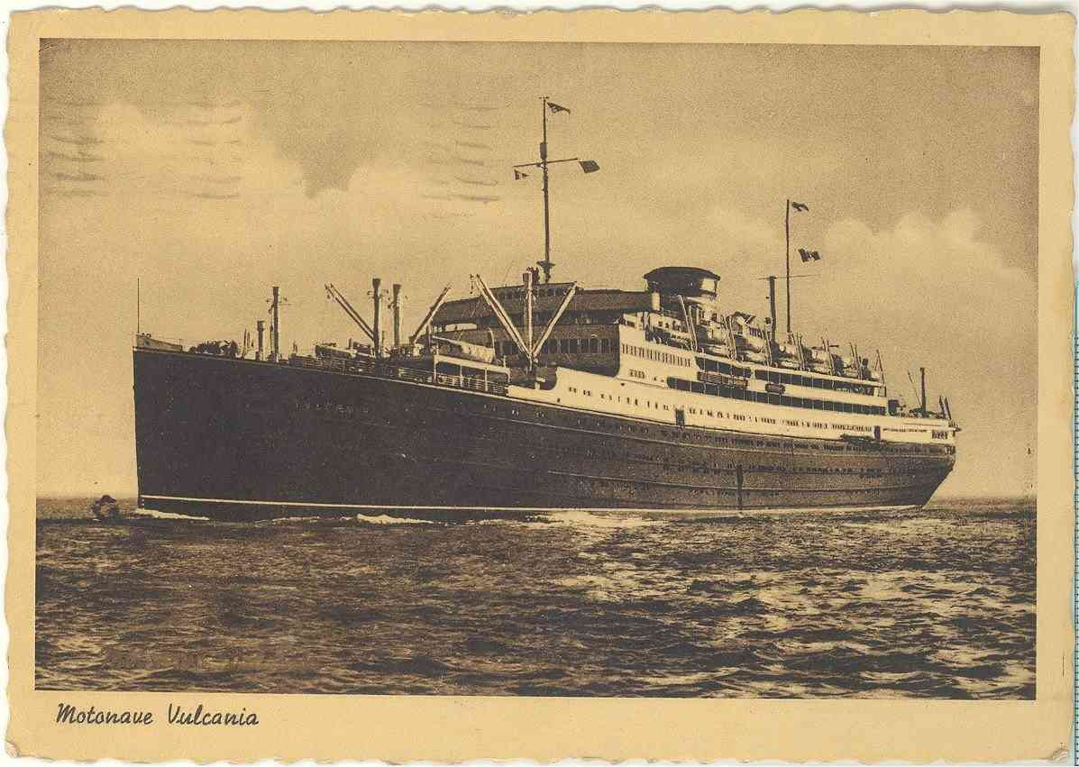 Motonave Vulcania - Italia